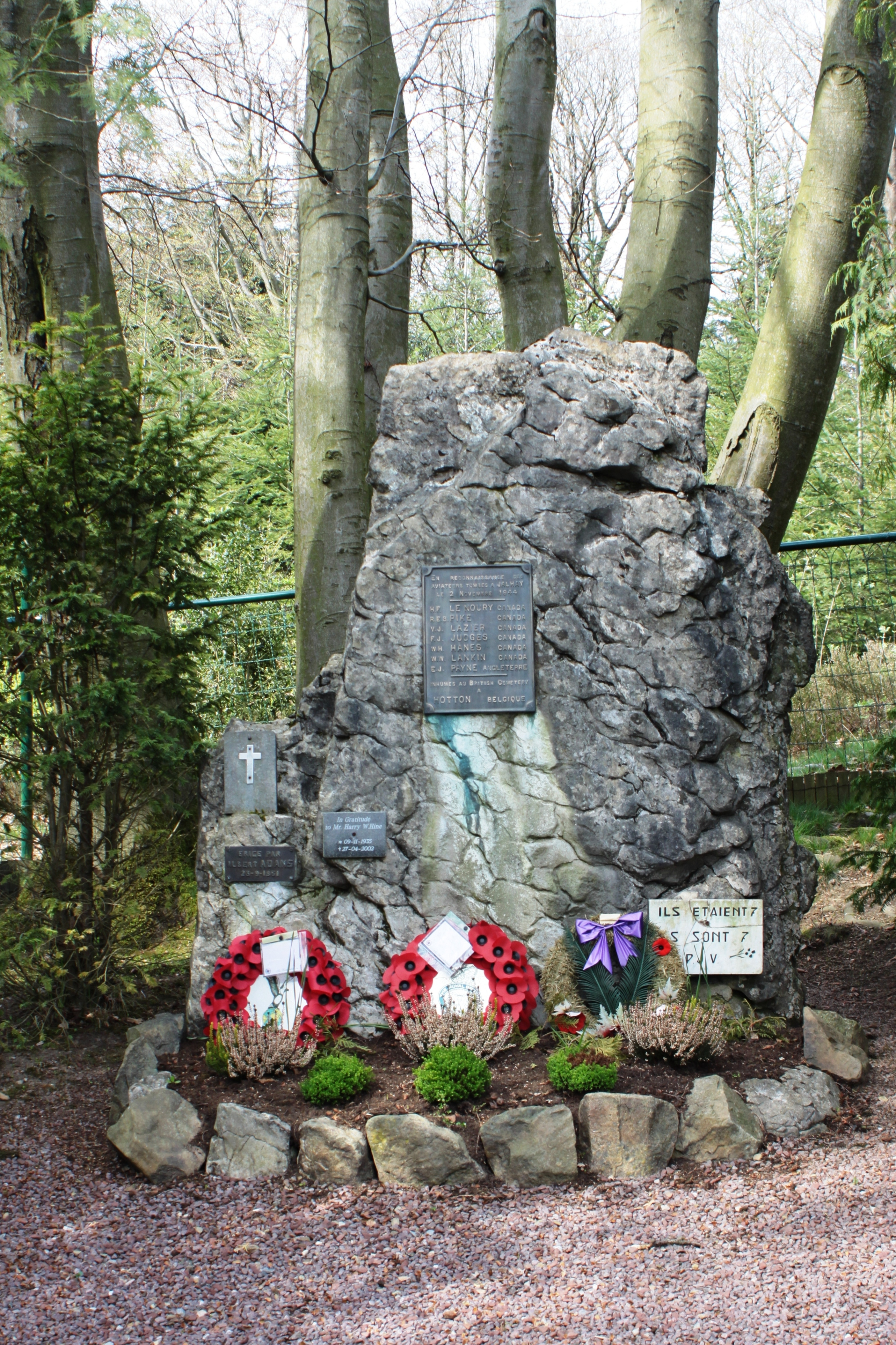 Monument au Tigelot commune de Jalhay en honneur de six aviateurs Candiens et un Écossais morts lors de l'atterrissage forcé de leur bombardier Halifax